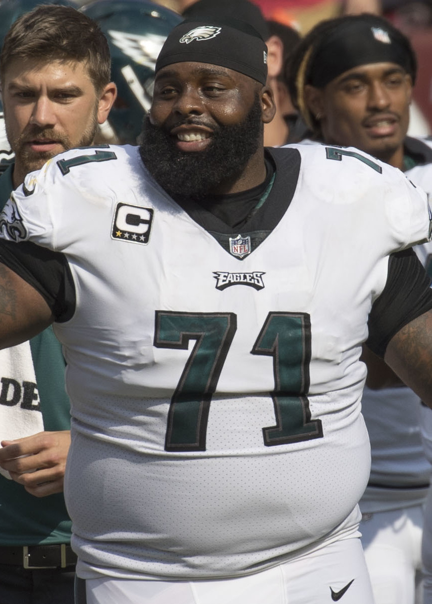 Eagles at Redskins 9/10/17